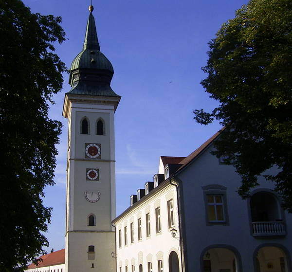 Johannes Aubele (Original text: Kloster Rottenbuch) Turm der Pfarr- und ehemaligen Stiftskirche Mariä Geburt, davor das Botenhaus, ein Rest des Westflügels der ehem. Klosteranlage